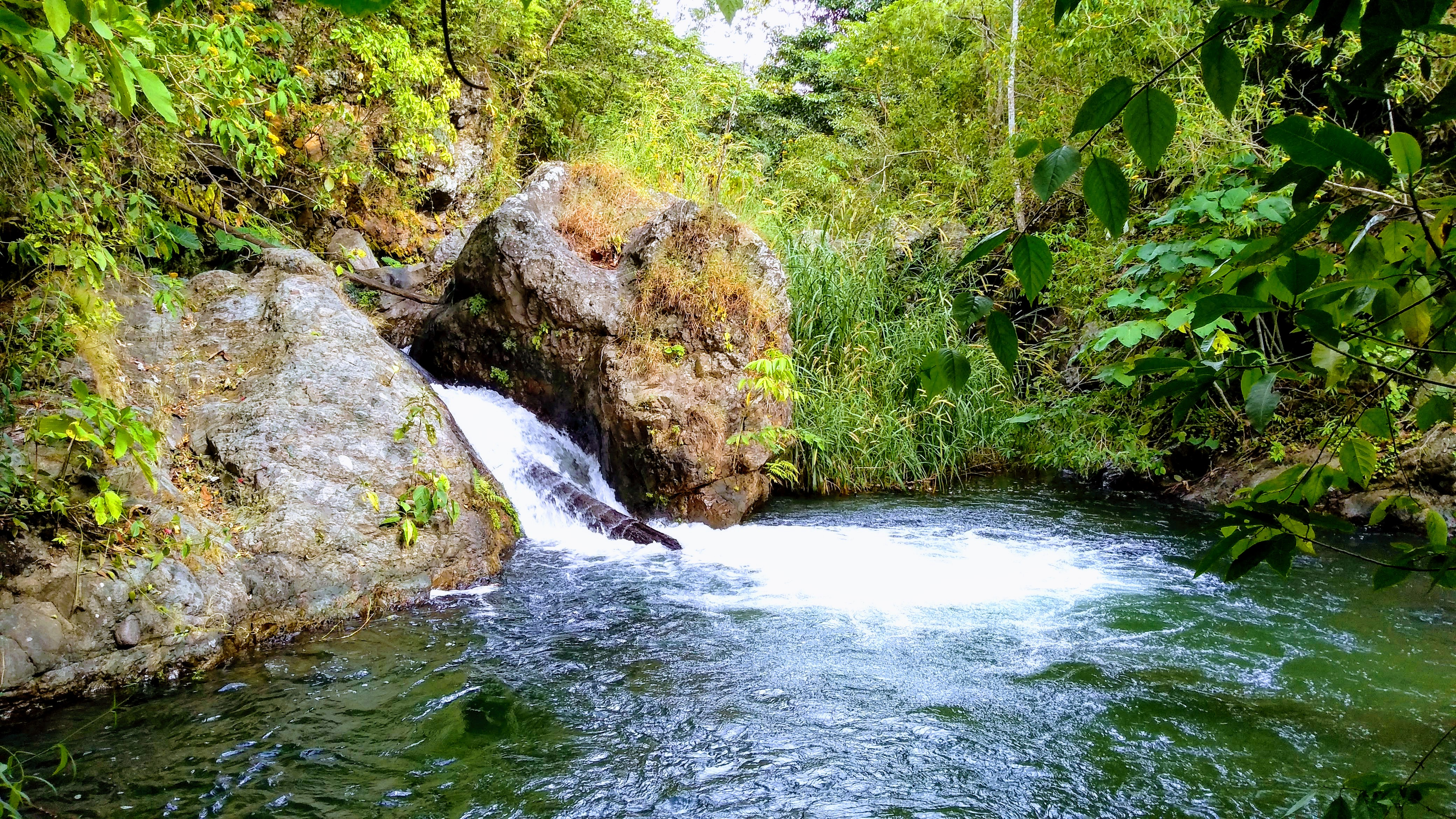 Posa En Plan de Ayala